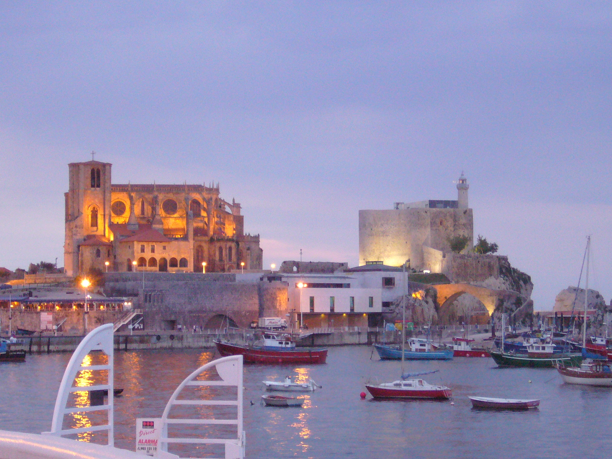 Puerto de Castro Urdiales (Cantabria, España).Iglesia de Santa María de la Asunción, el faro del Castillo de Santa Ana.